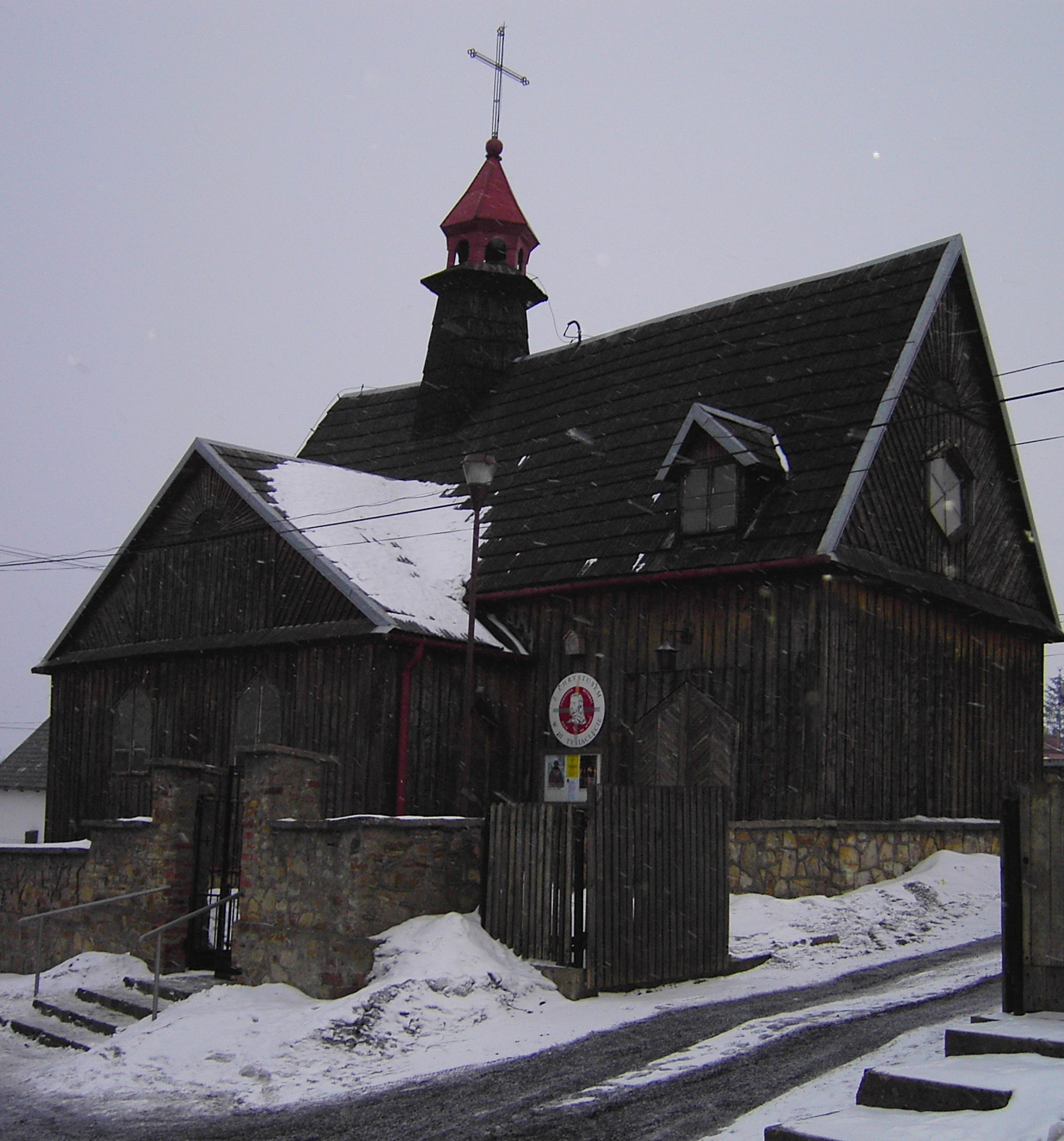 Kościół p.w.Wniebowzięcia Najświętszej Maryi Panny w Kielcach Zagórzu 404 z 15.01.1957 r. oraz 28.10.1971.